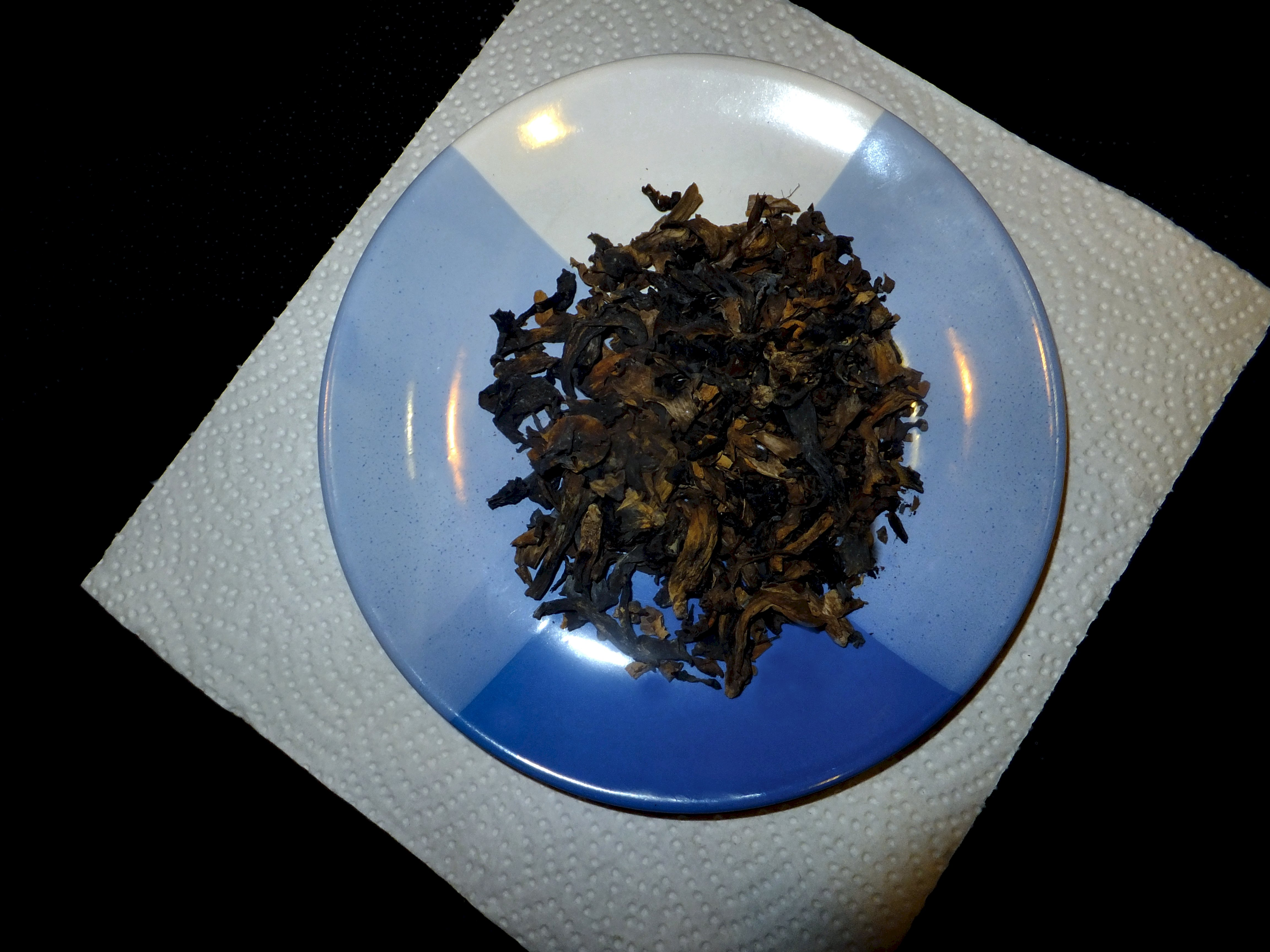 Dried Craterellus cornucopioides, getrocknete Herbsttrompete, burete de toamnă uscat